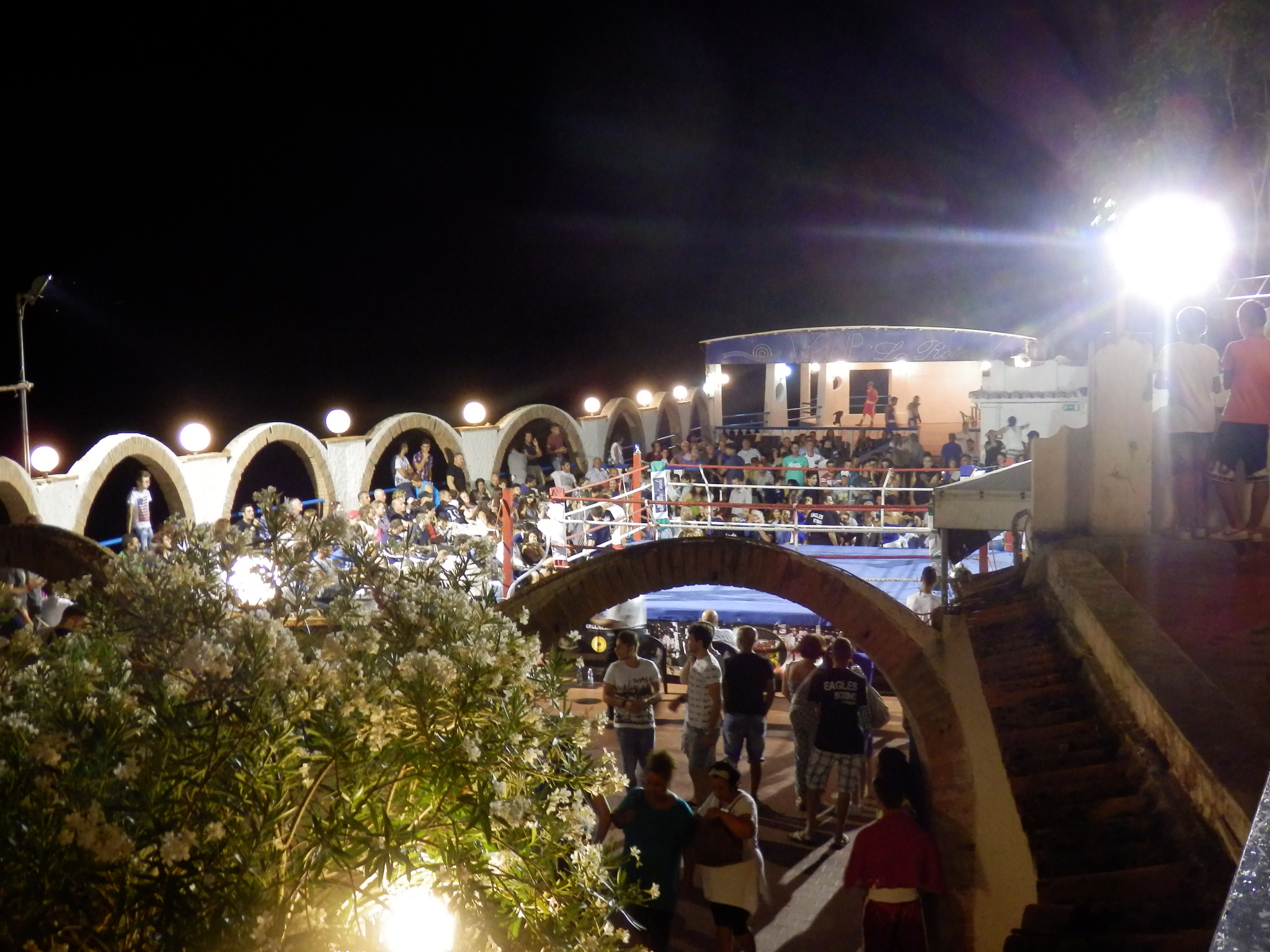 photo de la Rotonda de Copanello Lido le 26 juillet 2015 lors du 5e Trophée de Boxe «Guglielmo Papaleo».